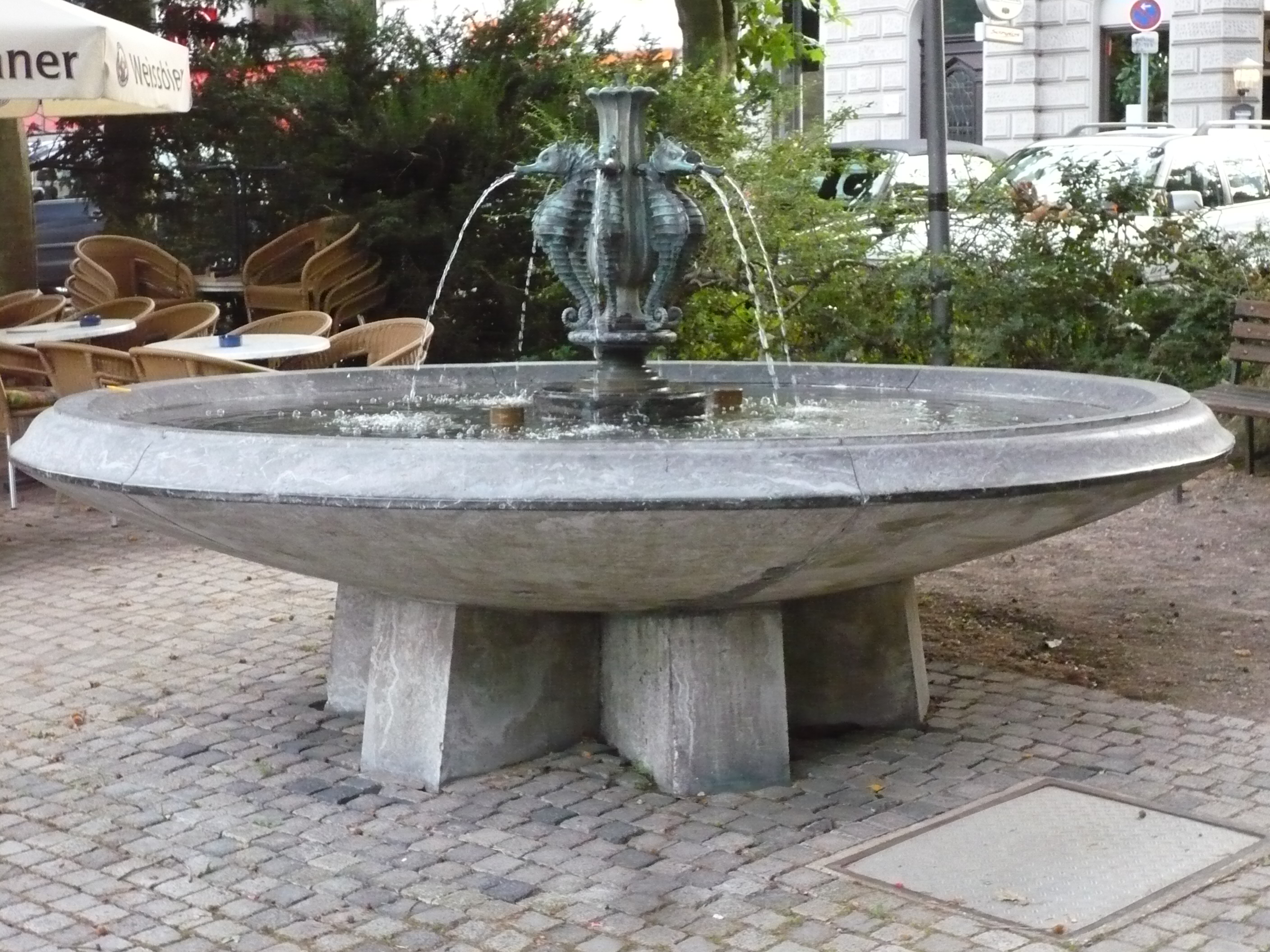 Seepferdchenbrunnen in Aachen-Burtscheid, Kapellenstraße